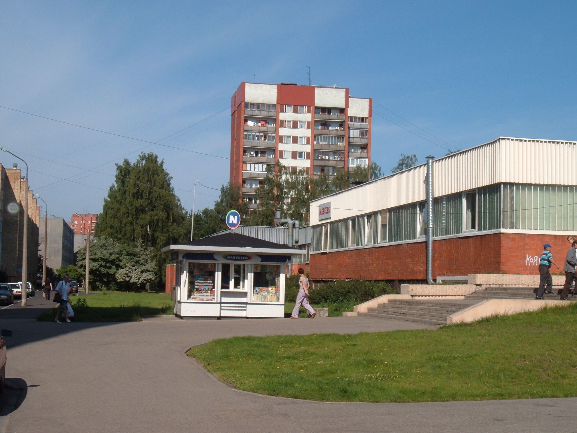 Imanta-1